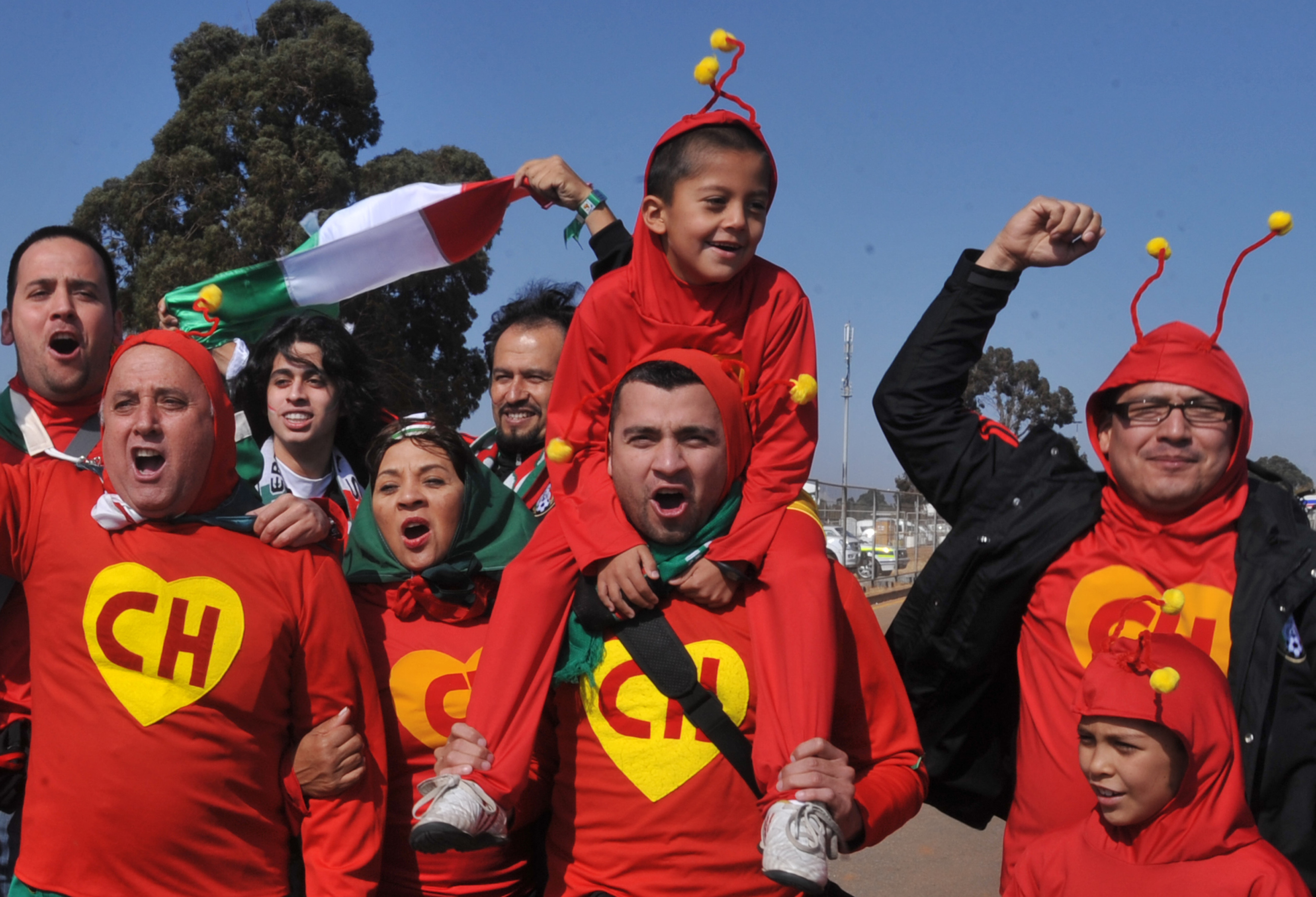 Joanesburgo - Torcedores de vários países lotam o Estádio Soccer City durante o jogo de abertura da Copa do Mundo. Fantasiados e usando camisas da África do Sul e do México, os torcedores fizeram uma festa enquanto se preparavam para entrar no estádio.